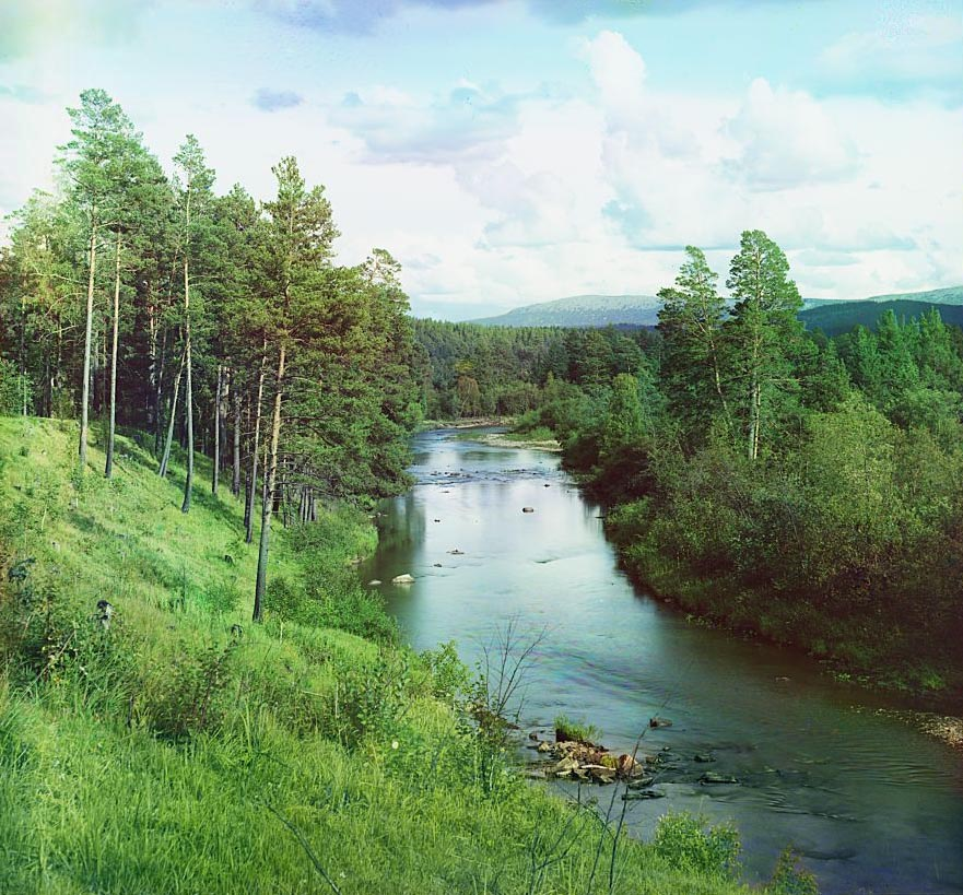 Снимок сделан близ Саткинского завода на 31 км жд ветки Бердяуш-Бакал у пос. Карга (в наст. вр. Первомайский). В перспективе снимка виден хребет Зюраткуль.